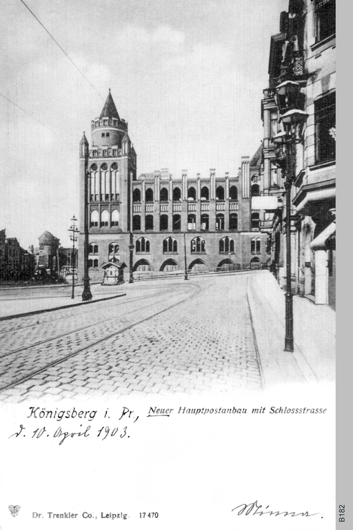 Königsberg